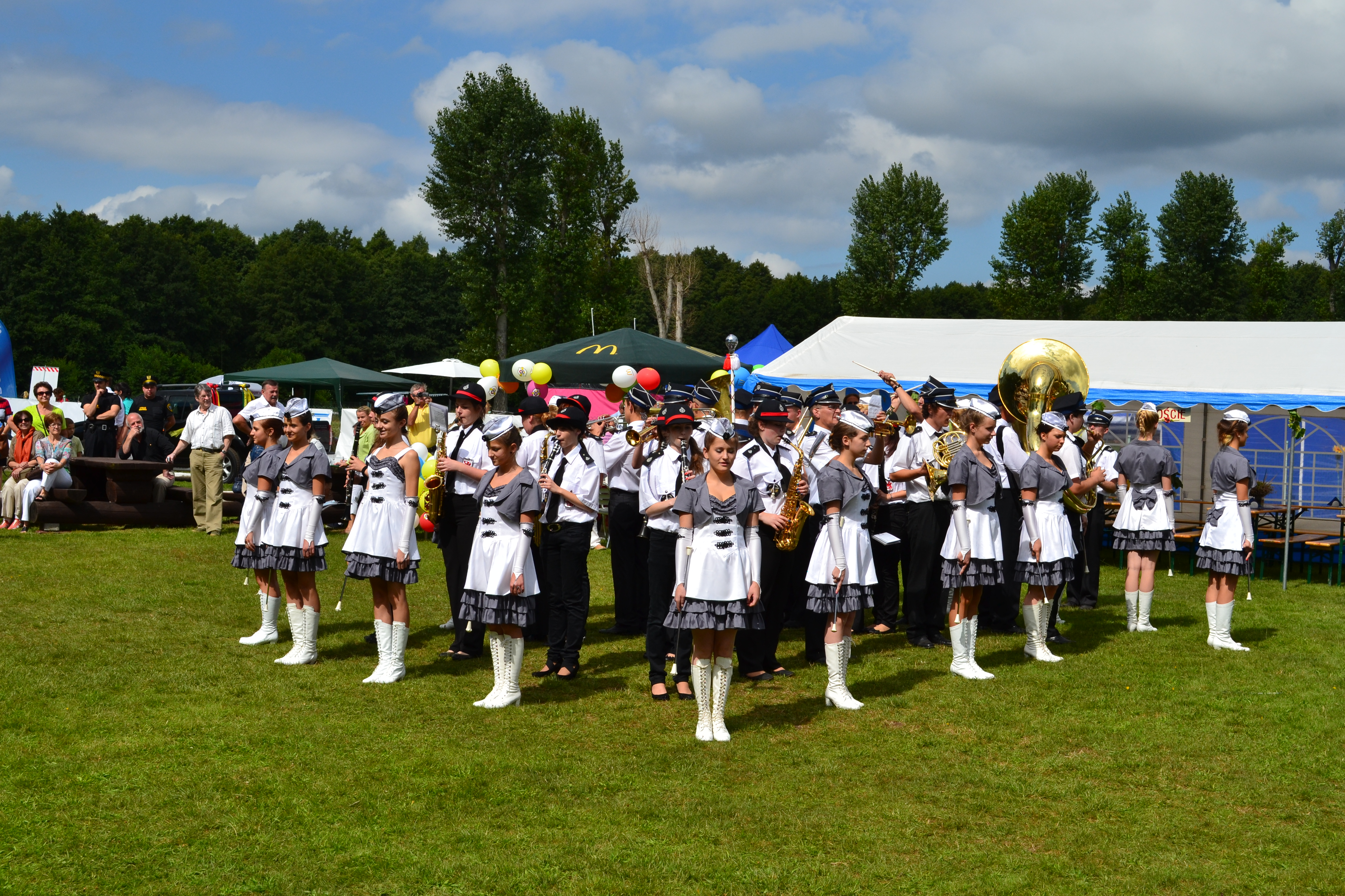 Dożynki 2012